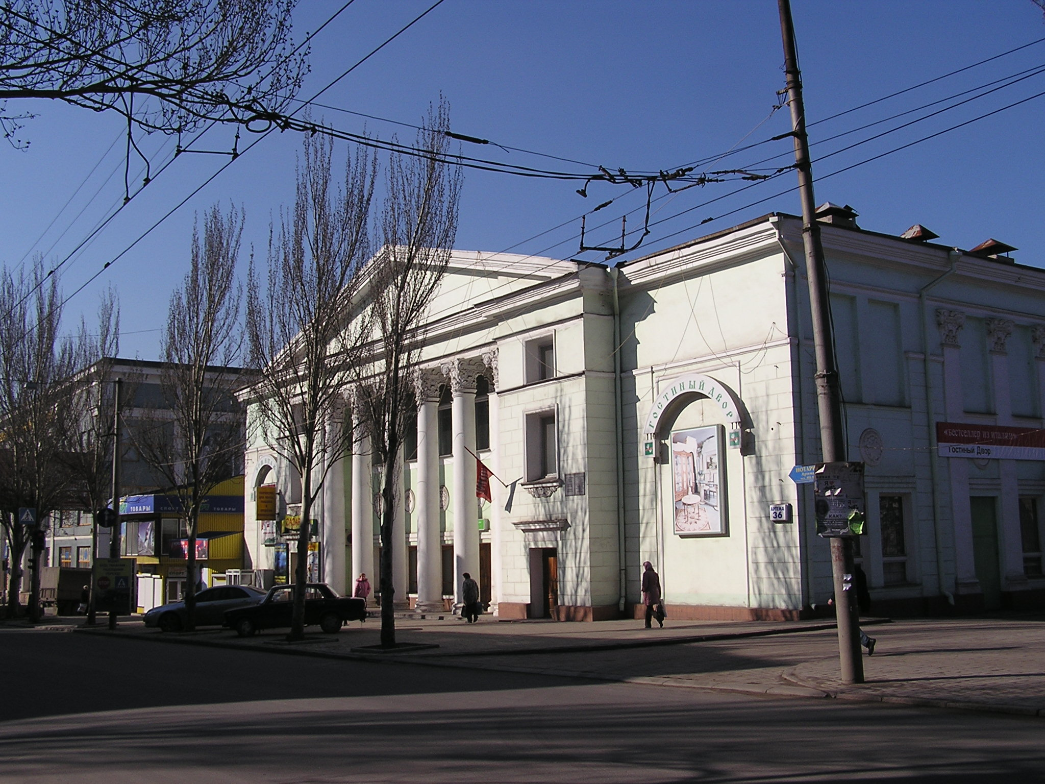 Донецк. Фасад кинотеатра «Комсомолец»